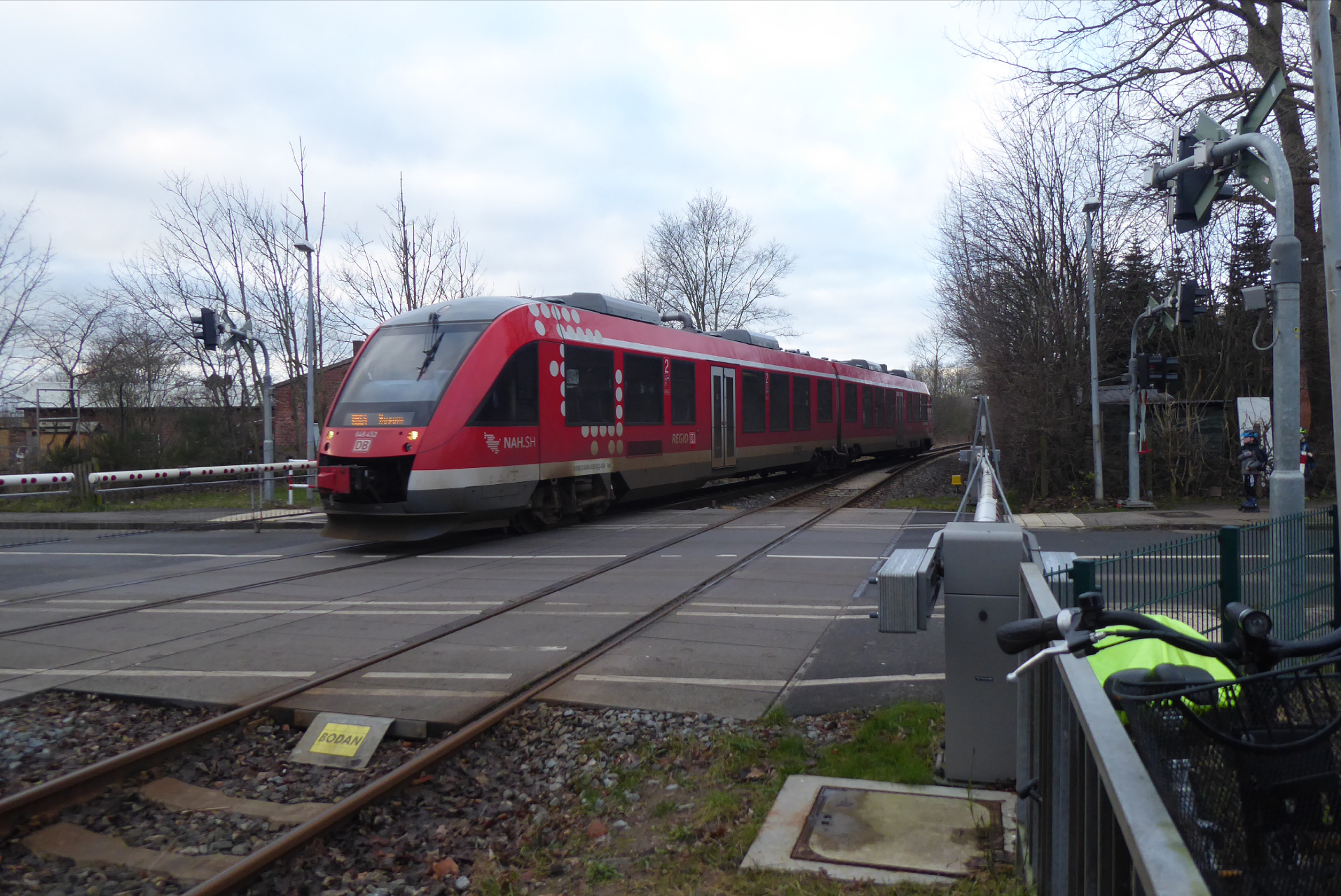 Regionalbahn 64 vom Typ Alstom Coradia LINT 41 innerhalb des Nahverkehrsverbunds Schleswig-Holstein bei der Ausfahrt aus dem Bahnhof Tönning zur Weiterfahrt nach Husum.